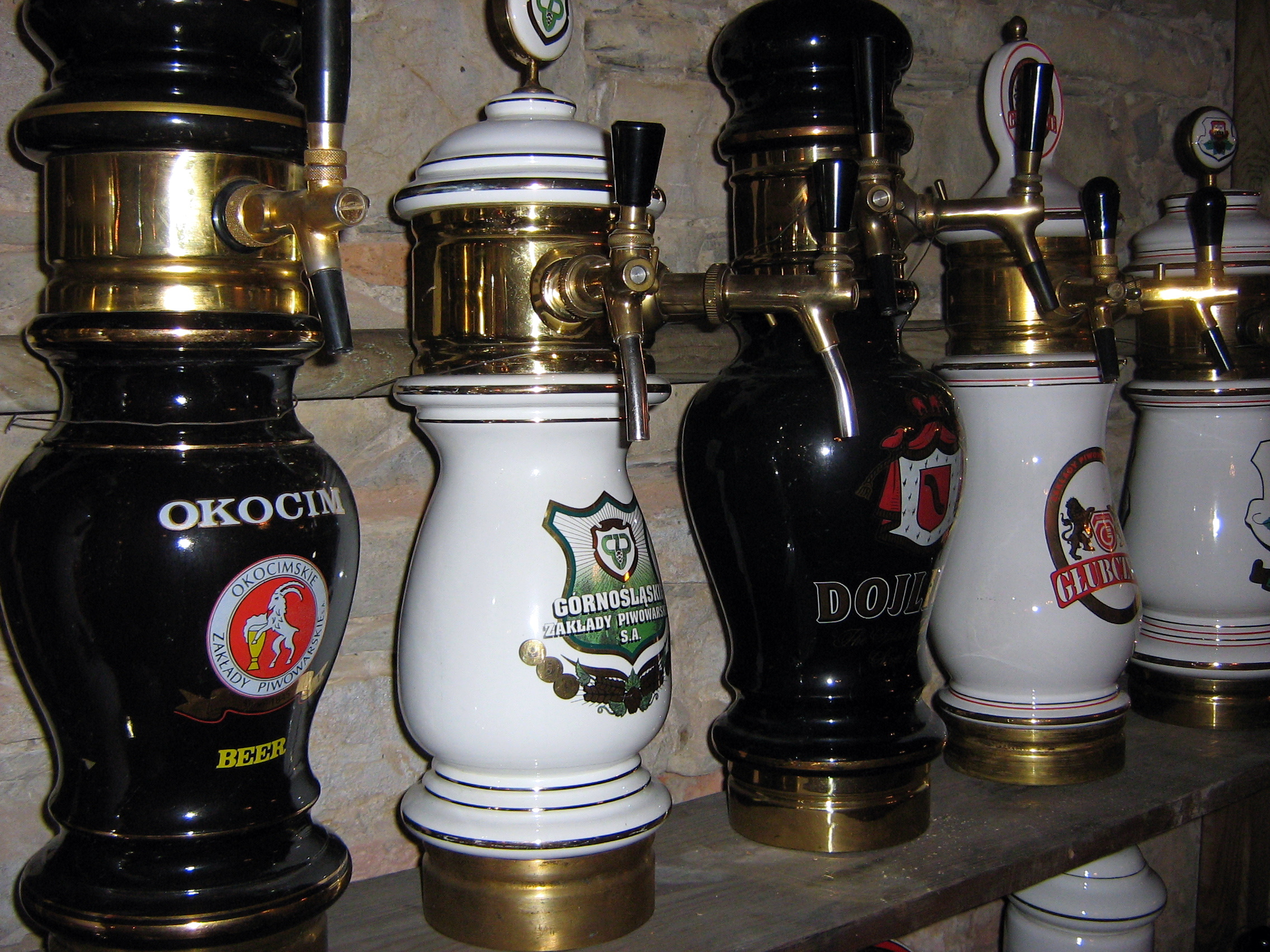 Kolekcja nalewaków z polskich browarów